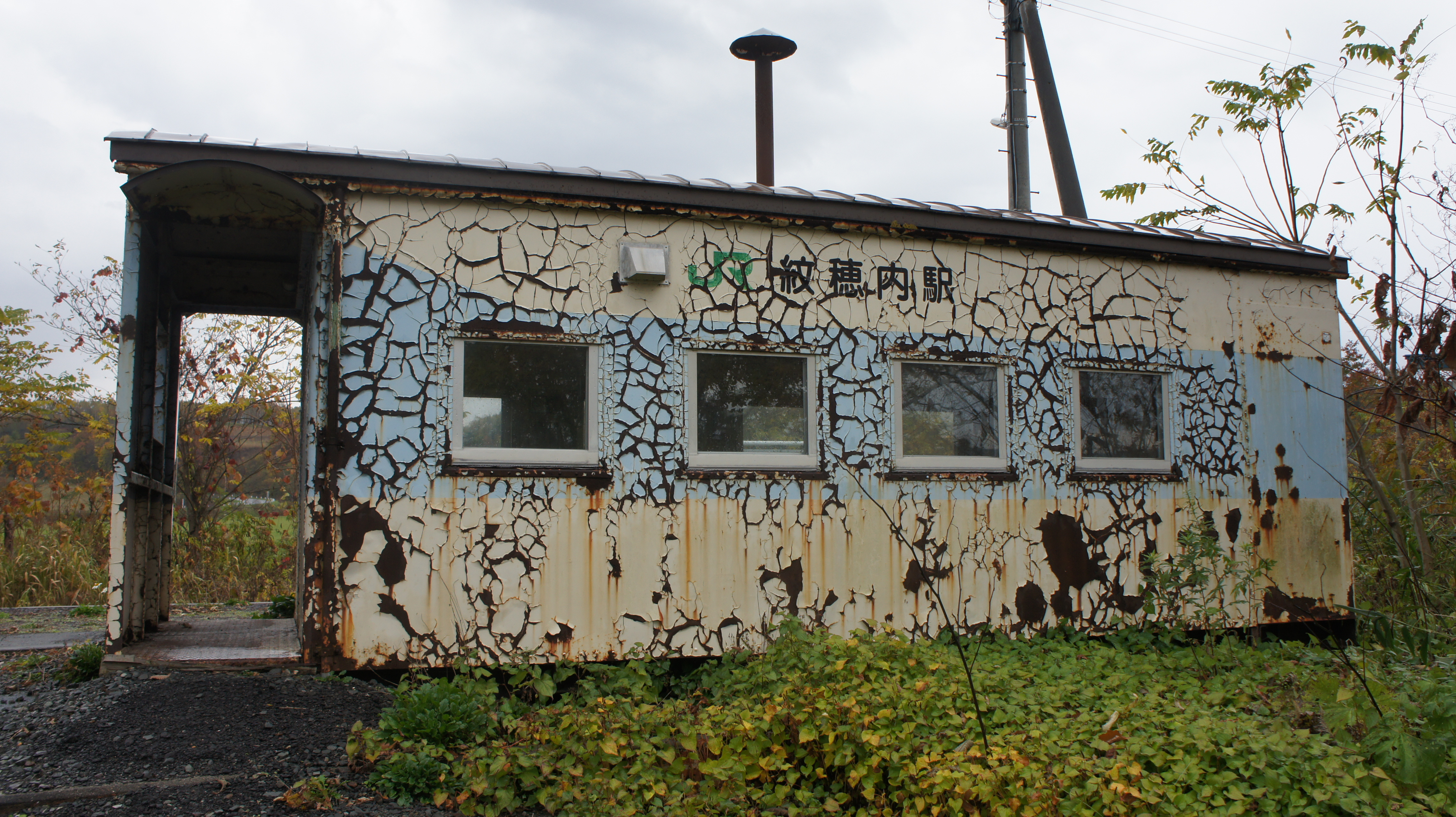 JR宗谷本線・紋穂内駅の駅舎 Sony NEX-3